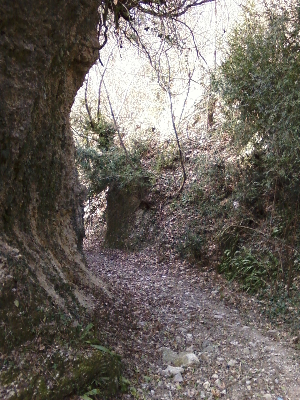 via buia , sito di ritrovamenti archeologici